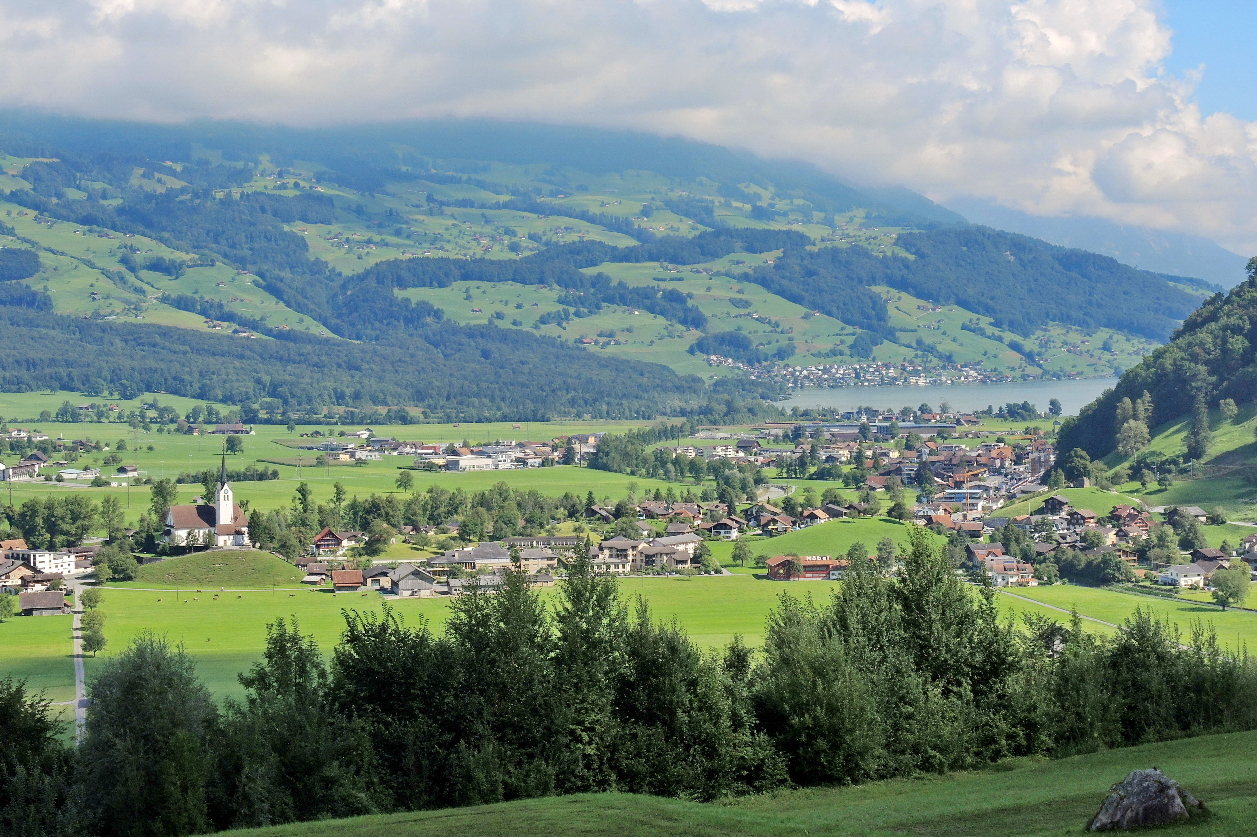 Giswil (OW) and Sarnersee as seen from Brünigstrasse (Switzerland)